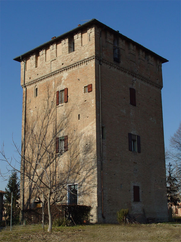 Description Torrione Valeri, ultimo resto di un quadrilatero difensivo di origine quattrocentesca a Baganzola, Parma - Italy. Date February 11, 2006 Location Baganzola - Parma - Italy Photographer Franco Folini